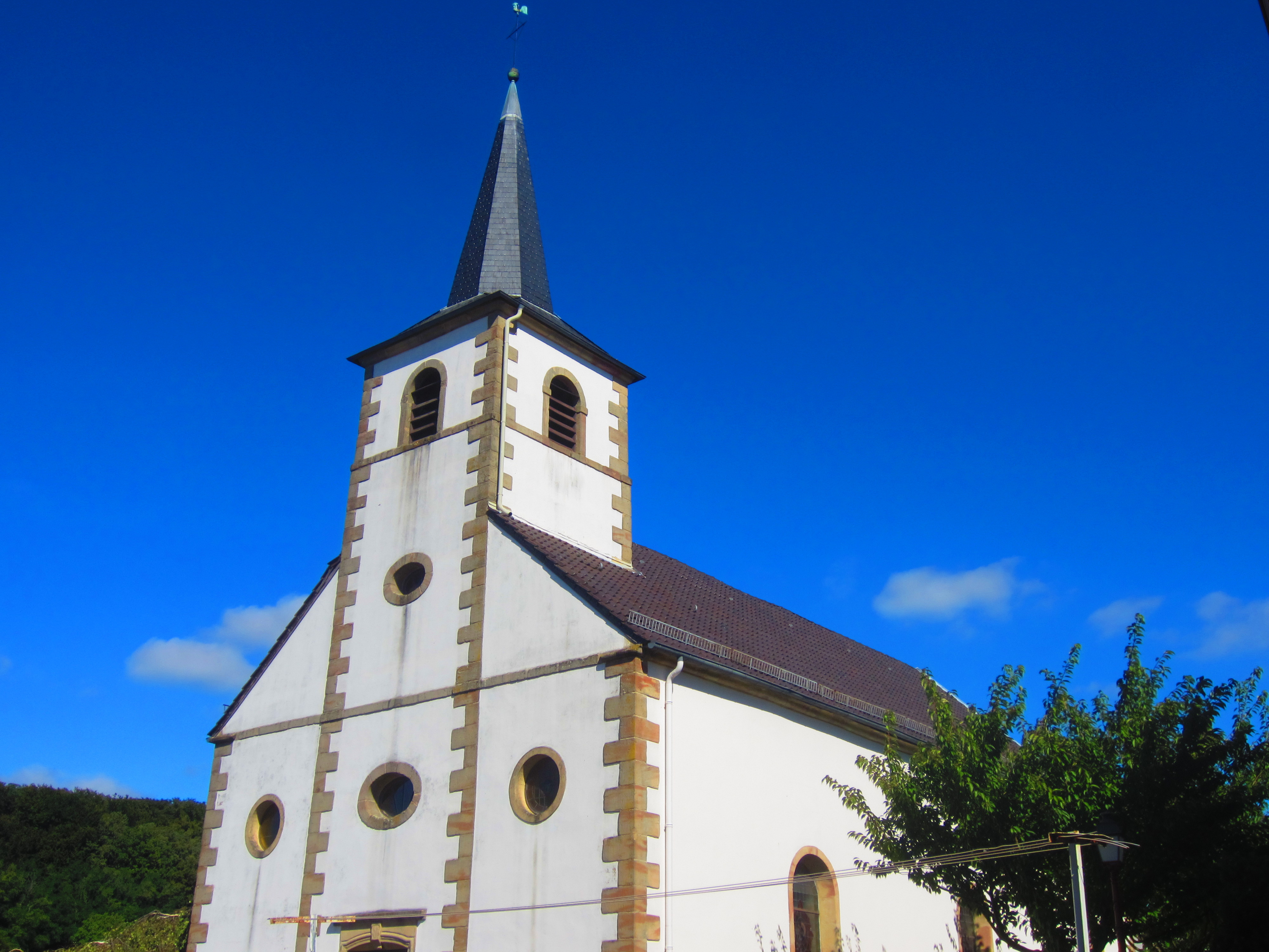 Eglise Berviller